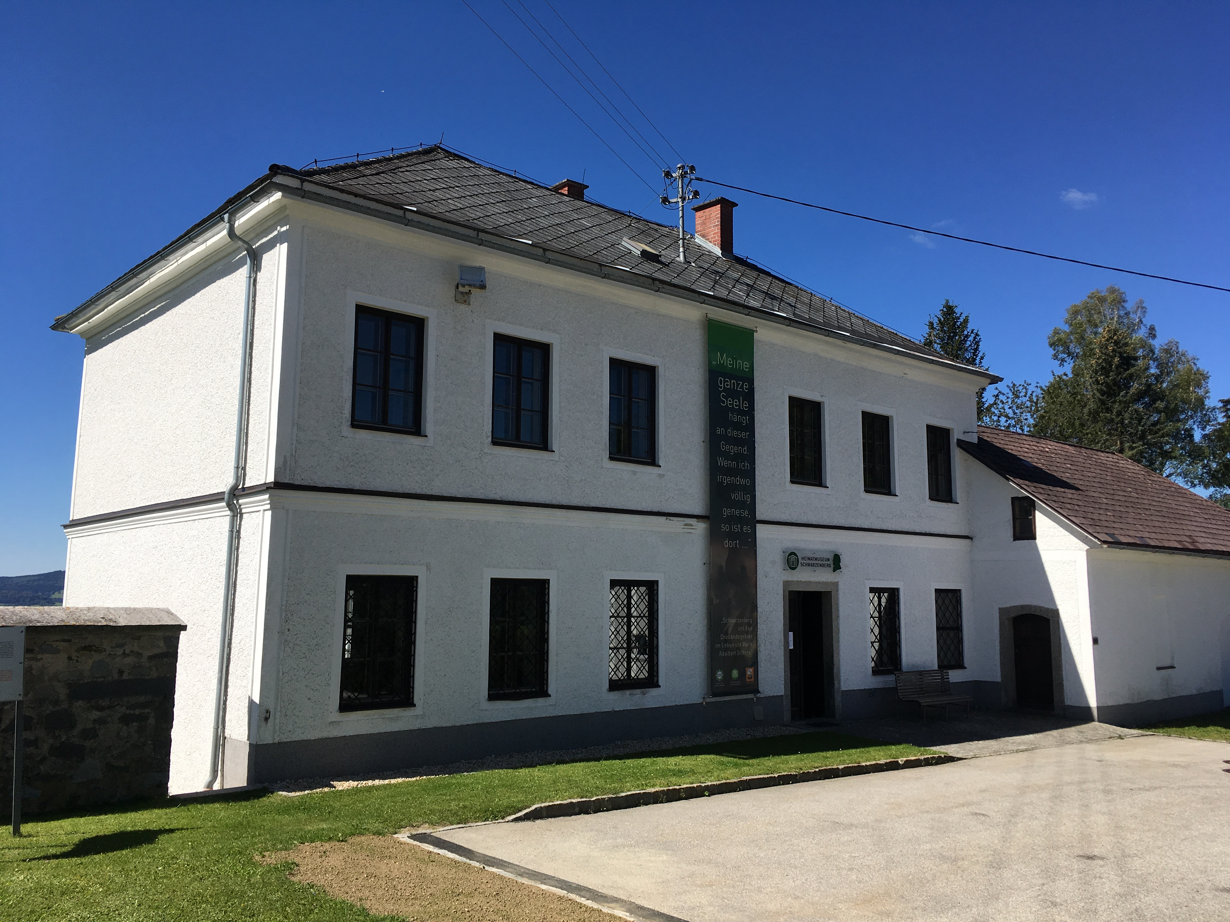 Heimat- und Stiftermuseum Schwarzenberg 2018